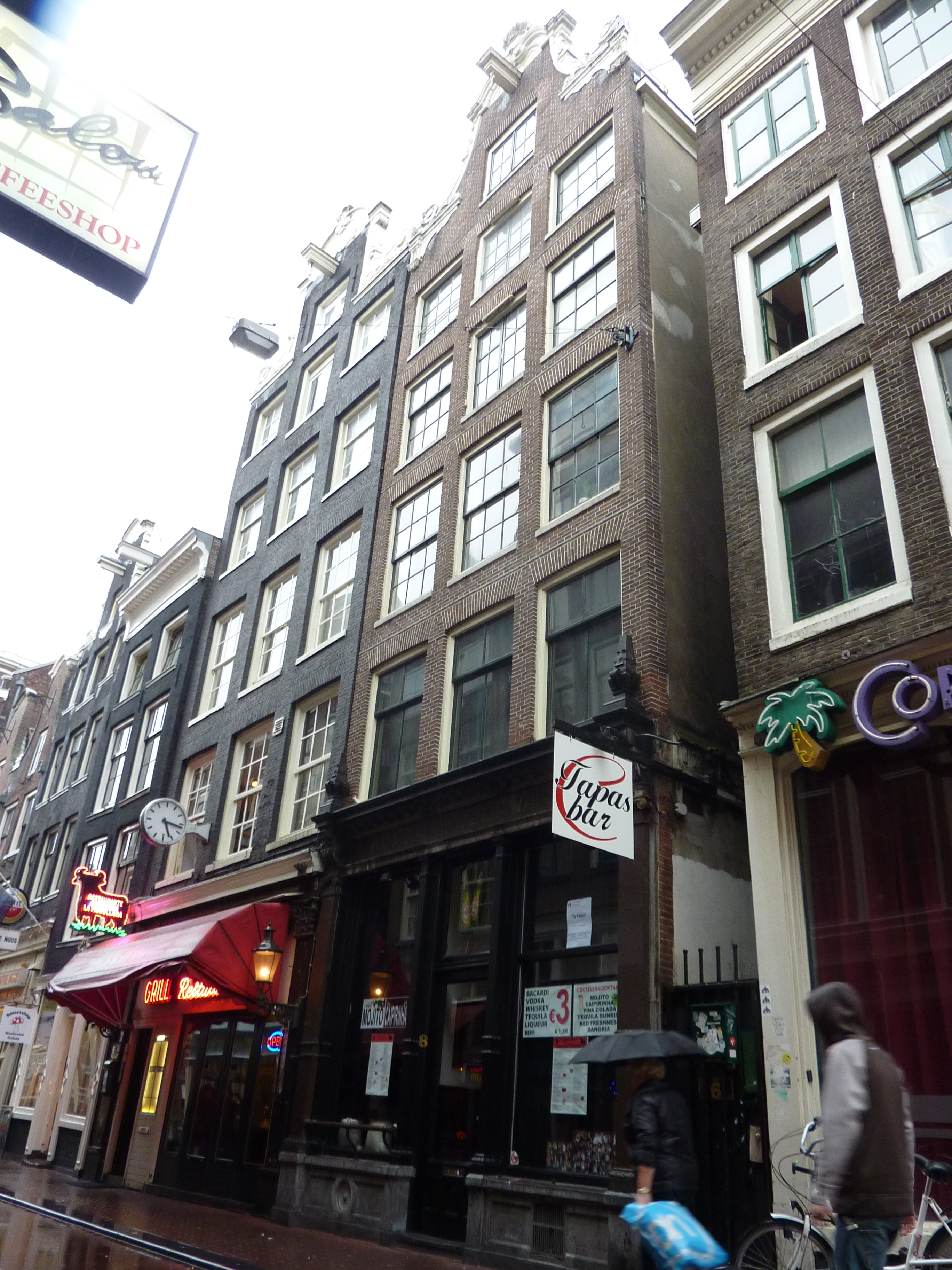 Halvemaansteeg 14-12-10-8